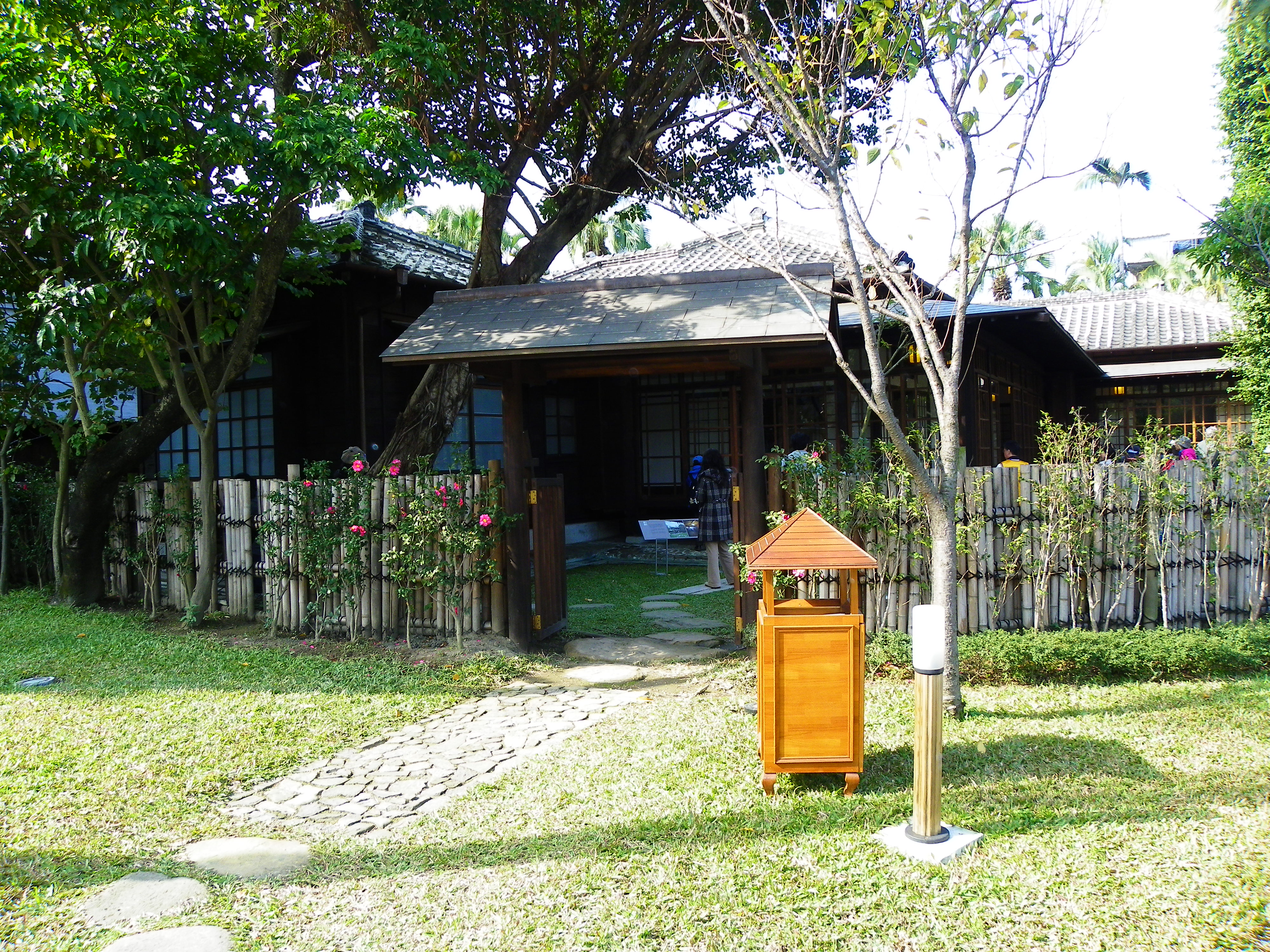 台北賓館和館（数寄屋）入口前。